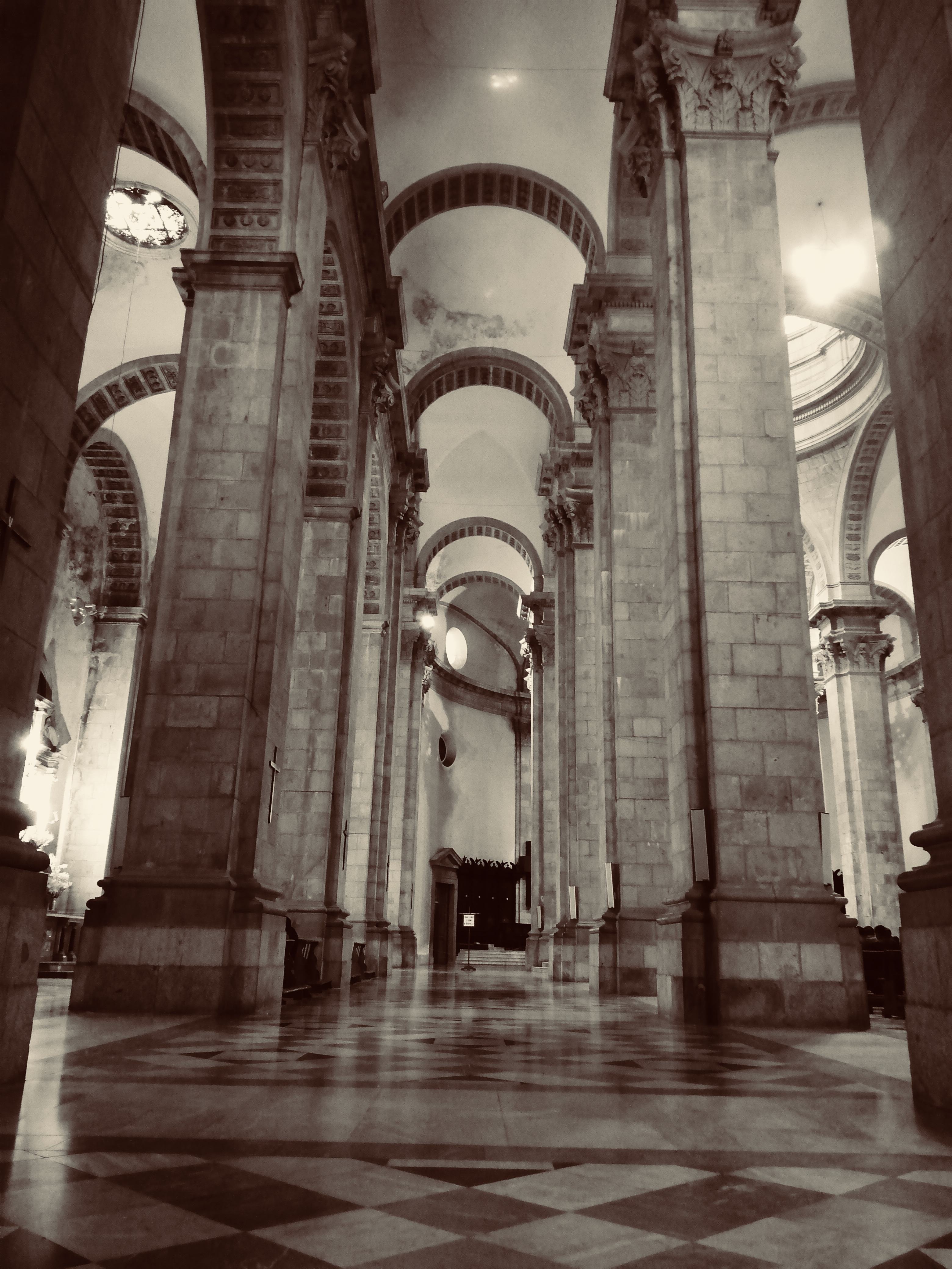 Interior de la Catedral de Nuestra Señora de La Paz en Bolivia